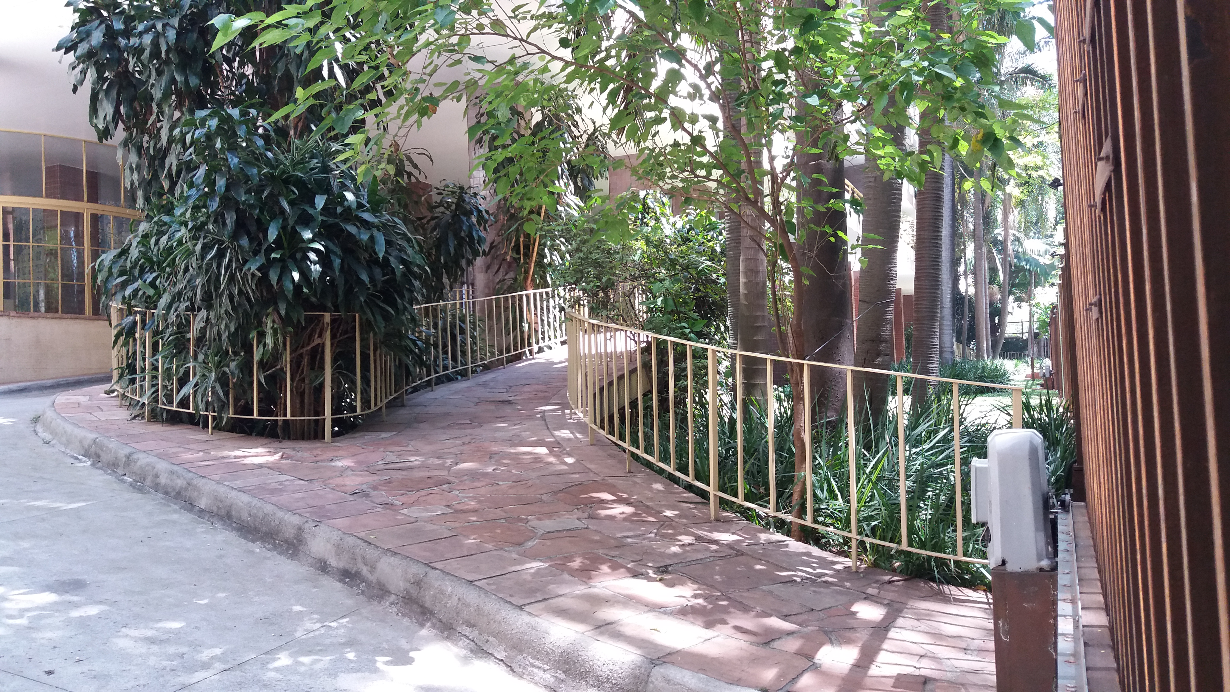 Entrada do Edifício Prudência, em São Paulo (SP), Brasil